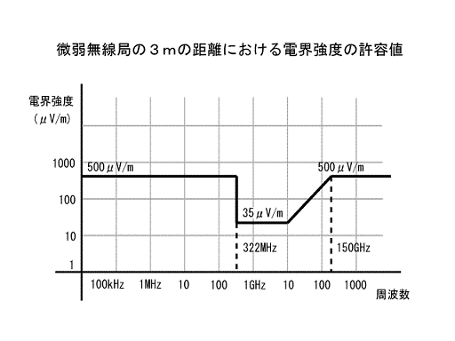 微弱無線局として許容される3m地点での電界強度